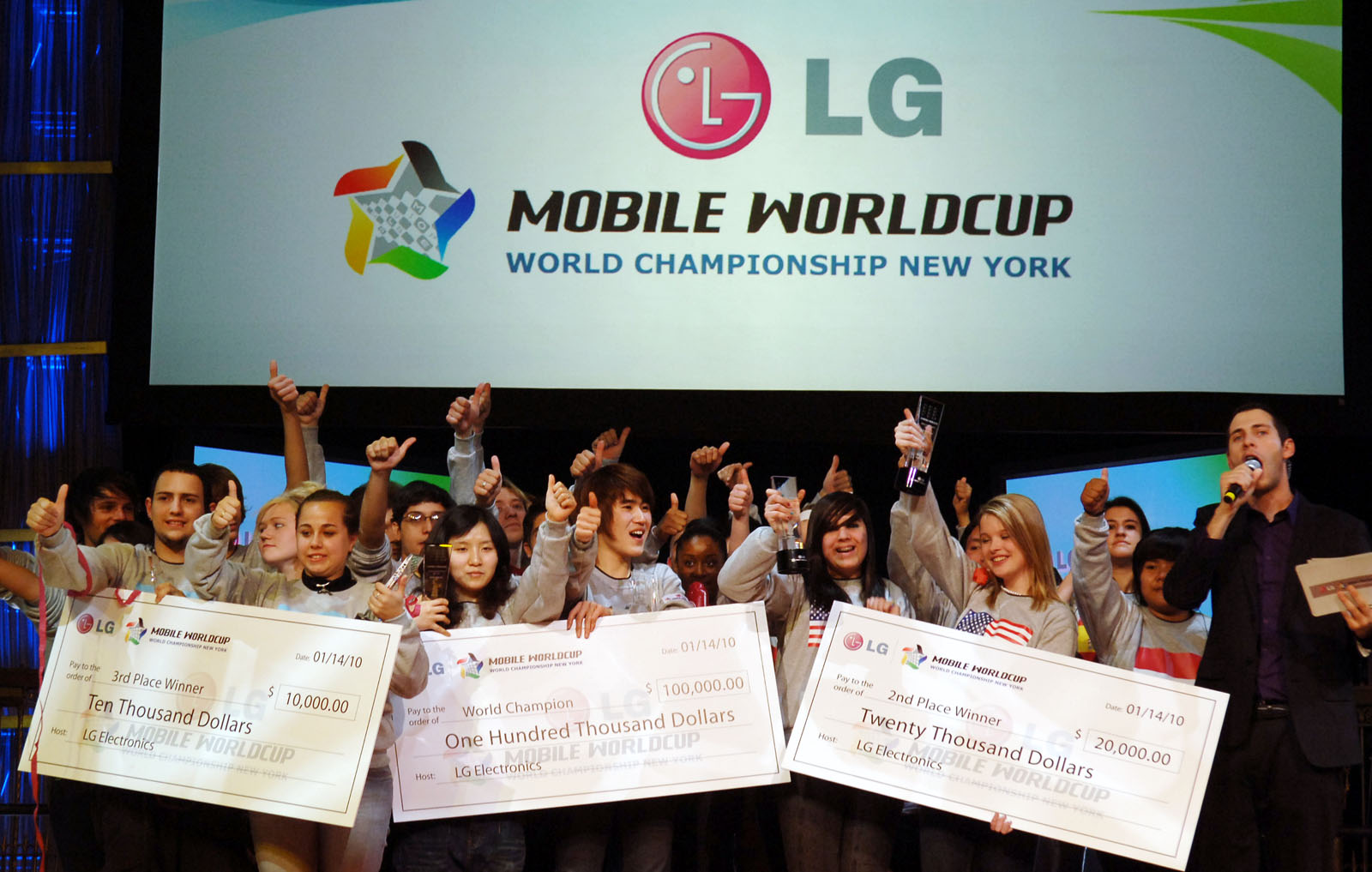 'LG 모바일 월드컵' 결승전 시상식